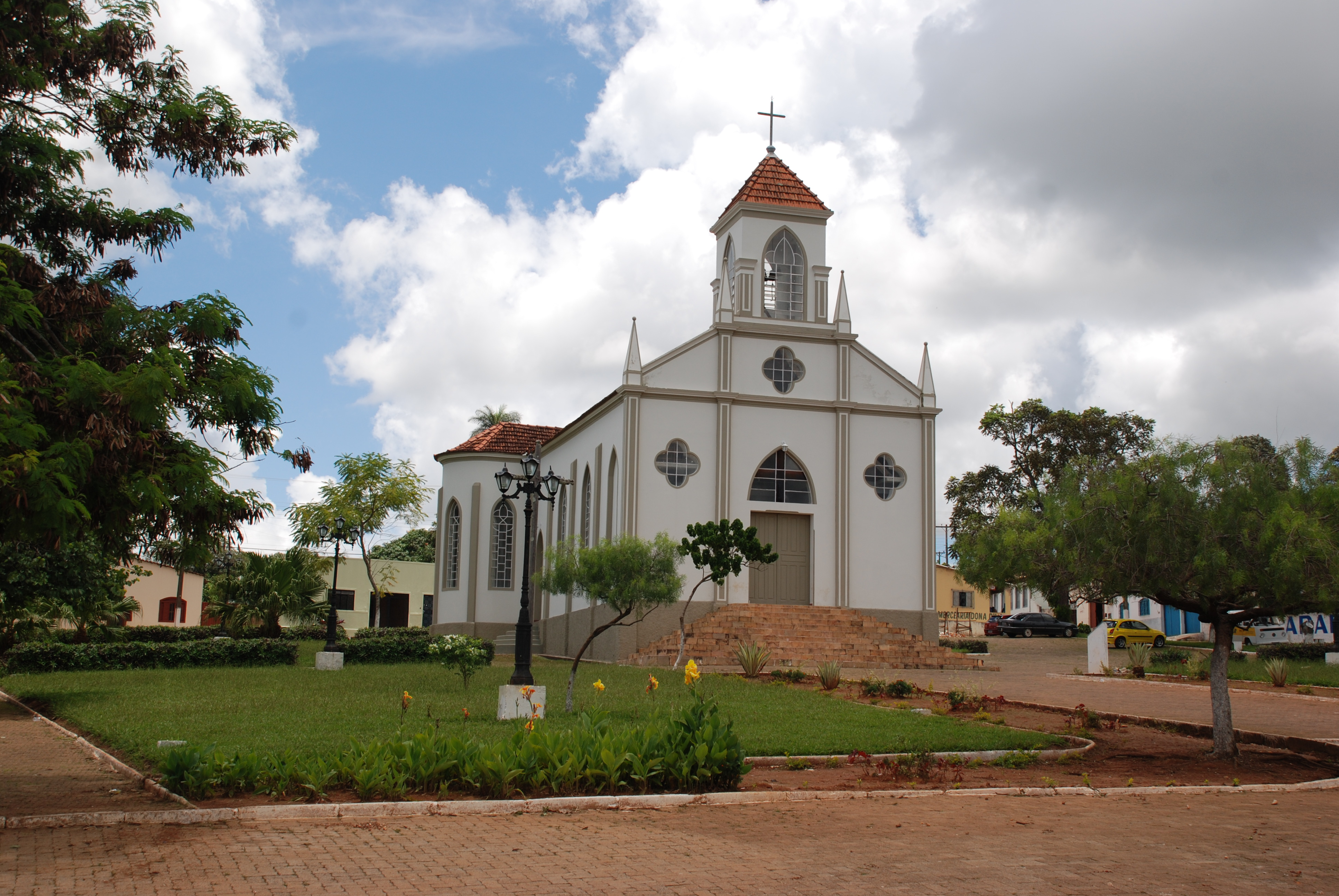 Foto da Igreja de São Sebastião, a mais antiga de Cristalina, construída em 1948 a igreja se localiza no Bairro Cristalina Velha.